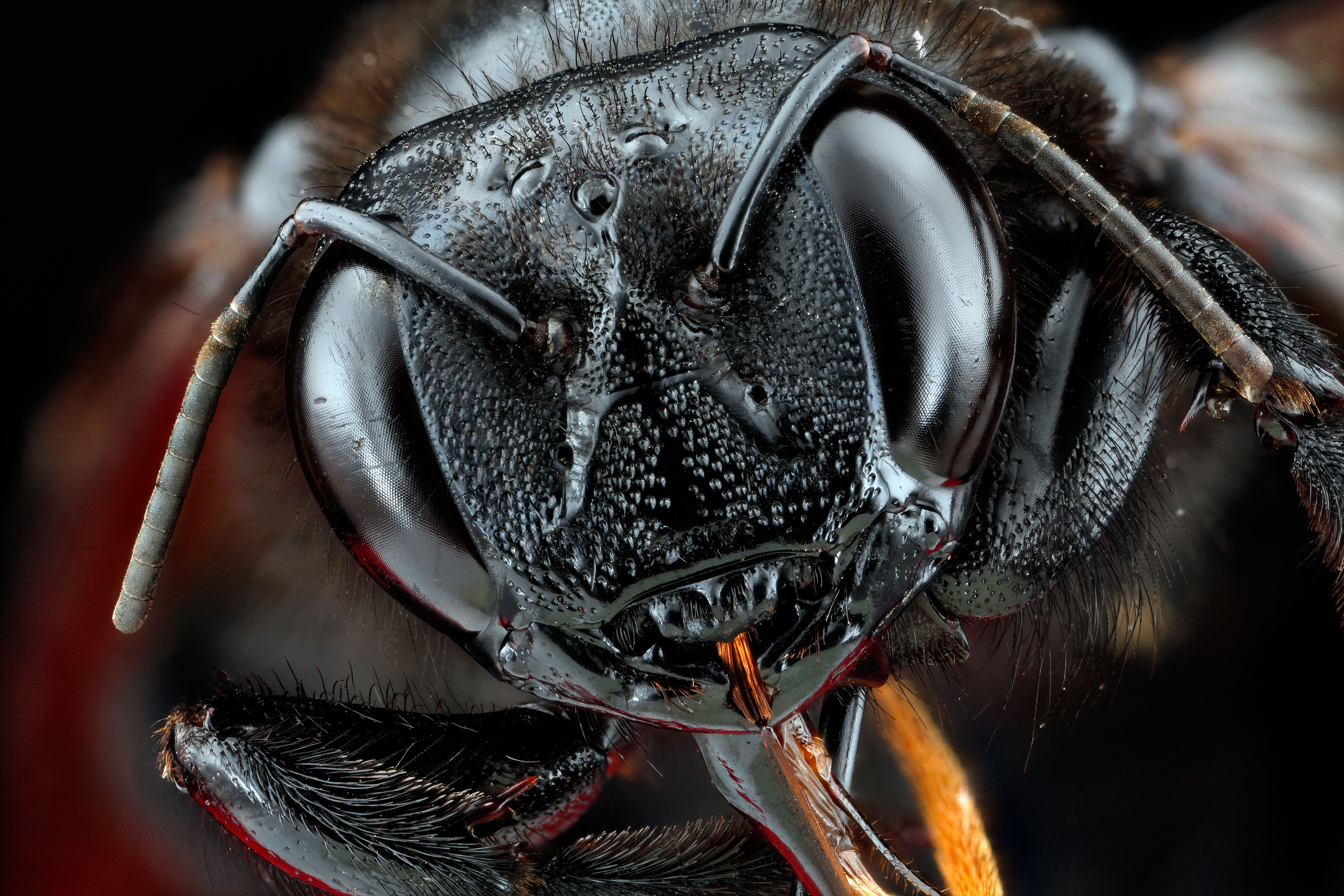 Xylocopa sonorina, Hawaii, Oahu March 2012